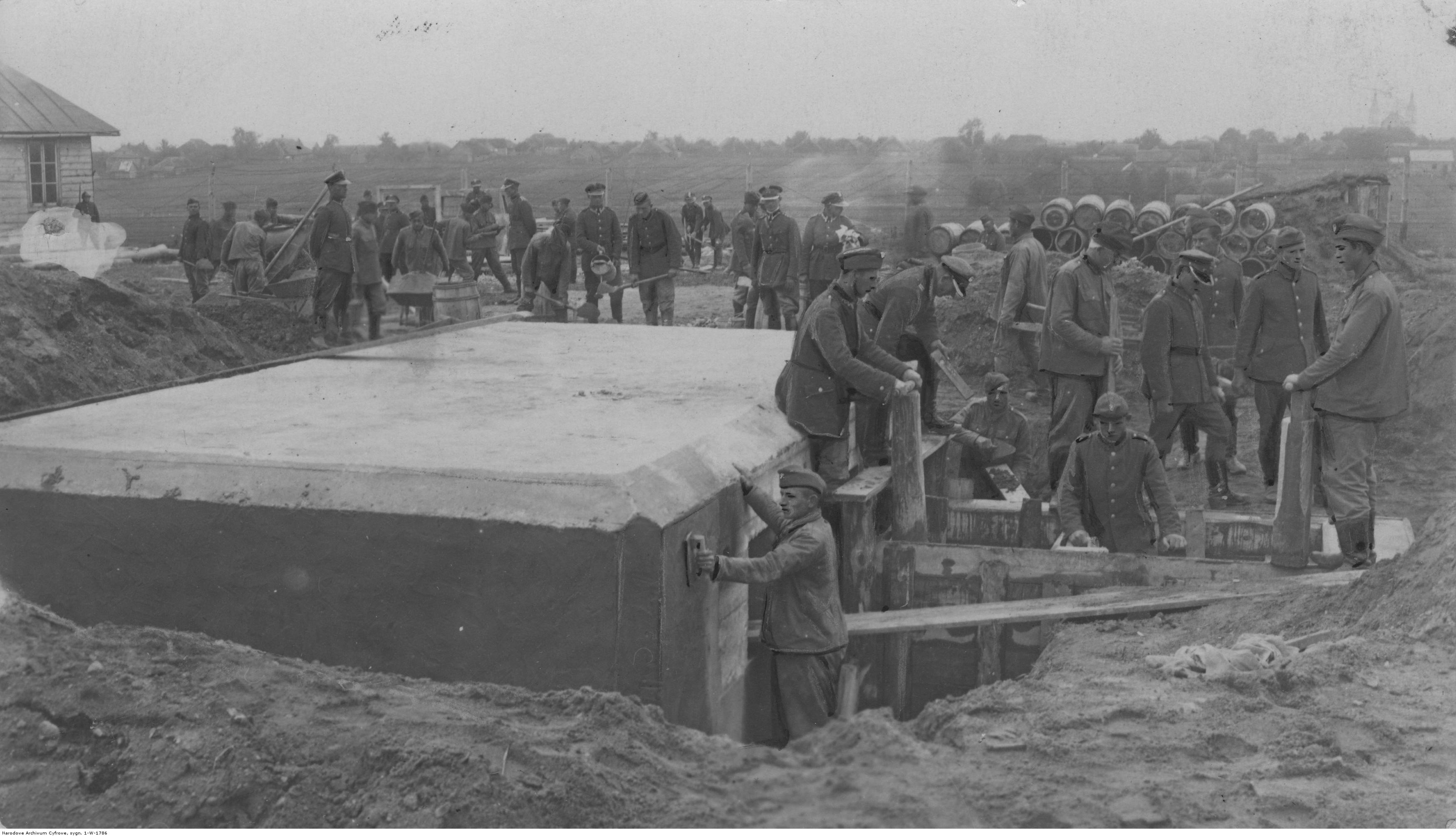 Nauka betoniarstwa w 9 Batalionie Korpusu Ochrony Pogranicza "Kleck"; żołnierze podczas betonowania, 1929 r. Koncern Ilustrowany Kurier Codzienny - Archiwum Ilustracji. Sygnatura: 1-W-1786